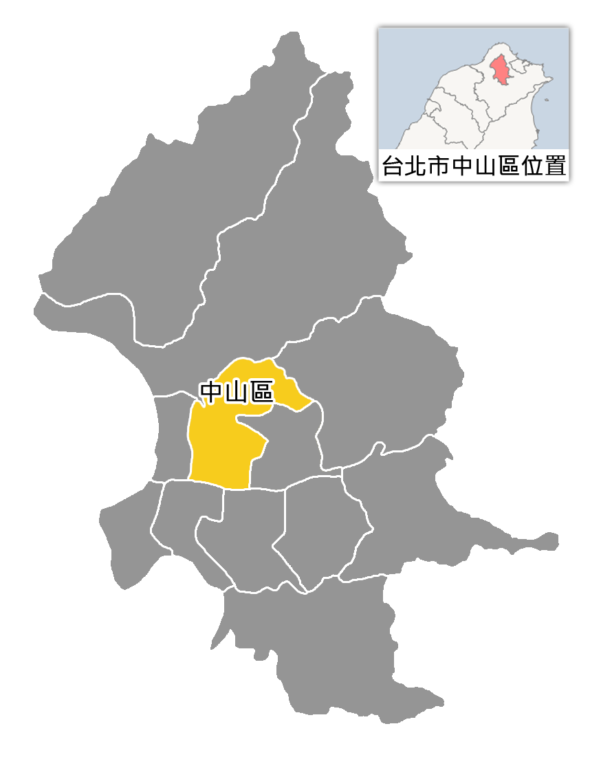 中文（台灣）: 台北市中山區位置。